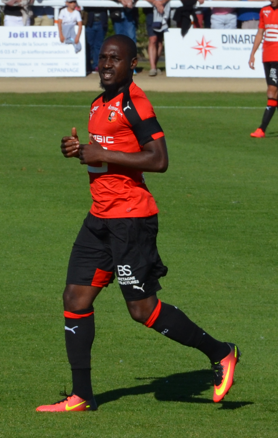 Photographie prise lors du match opposant le Stade rennais à l'USM Alger en match amical au stade Paul-Audrin de Dinard le 16 juillet 2016. Ici, Giovanni Sio.